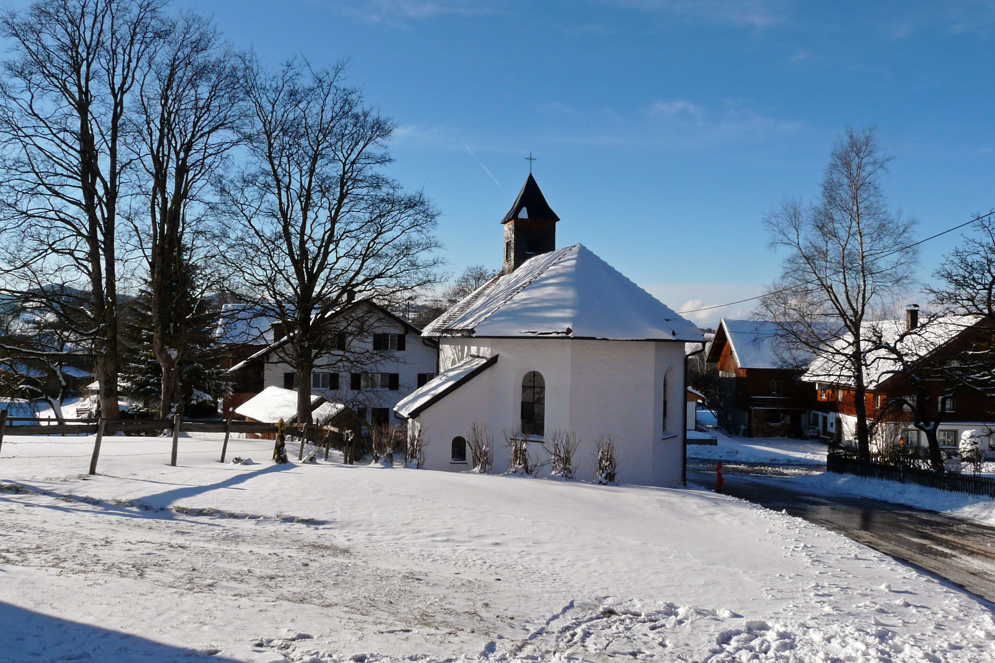 Kapelle in Guggemoos, Oy-Mittelberg